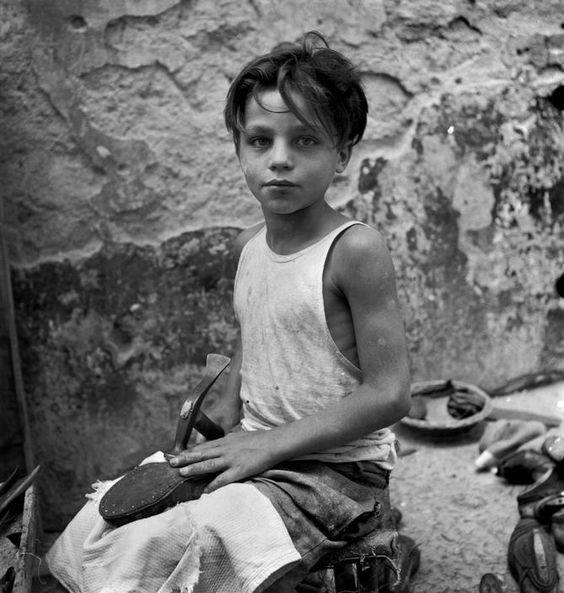 David Seymour - Napoli, bambino apprendista calzolaio.